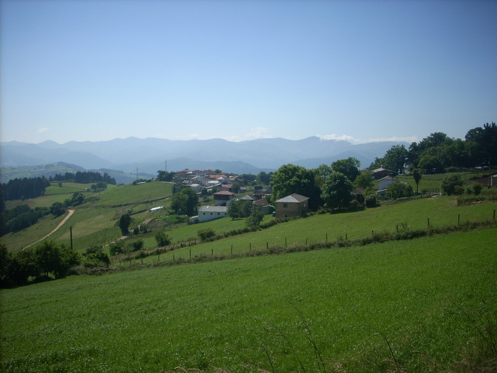 Foto de Fastias desde la carretera hacia el fondal.